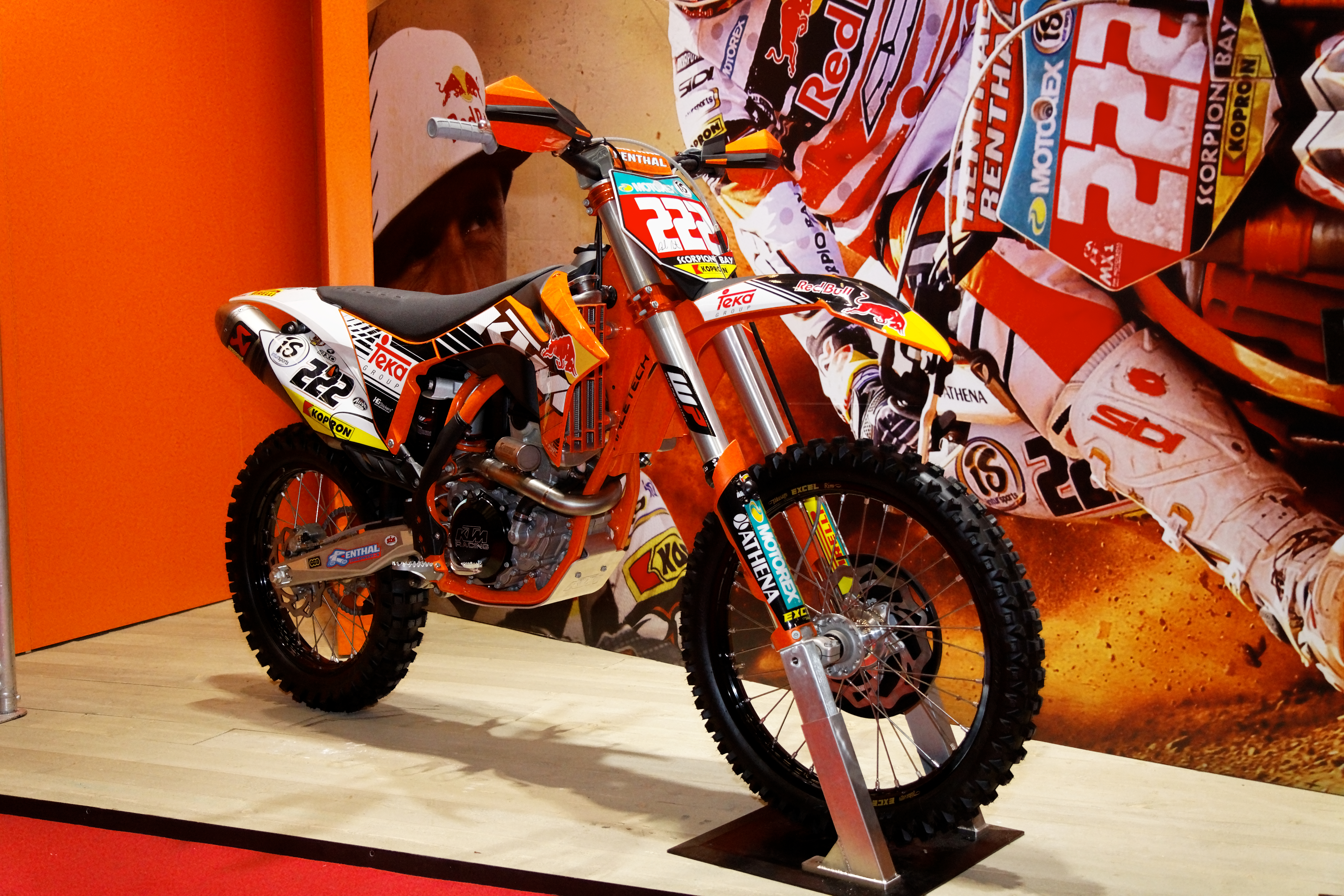 KTM - 350 SX-F LTD Edition Tony Cairoli